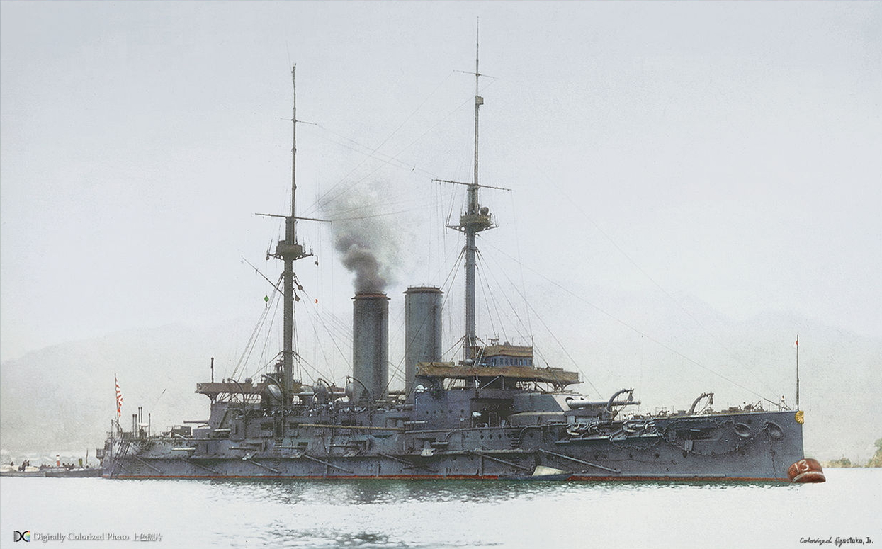 Japanese battleship Mikasa at Kure